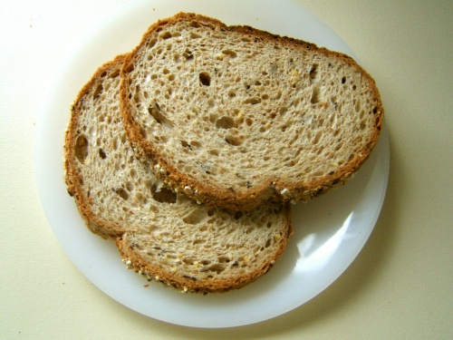 Meergranenbrood